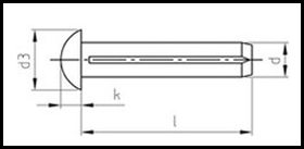 DIN 1476